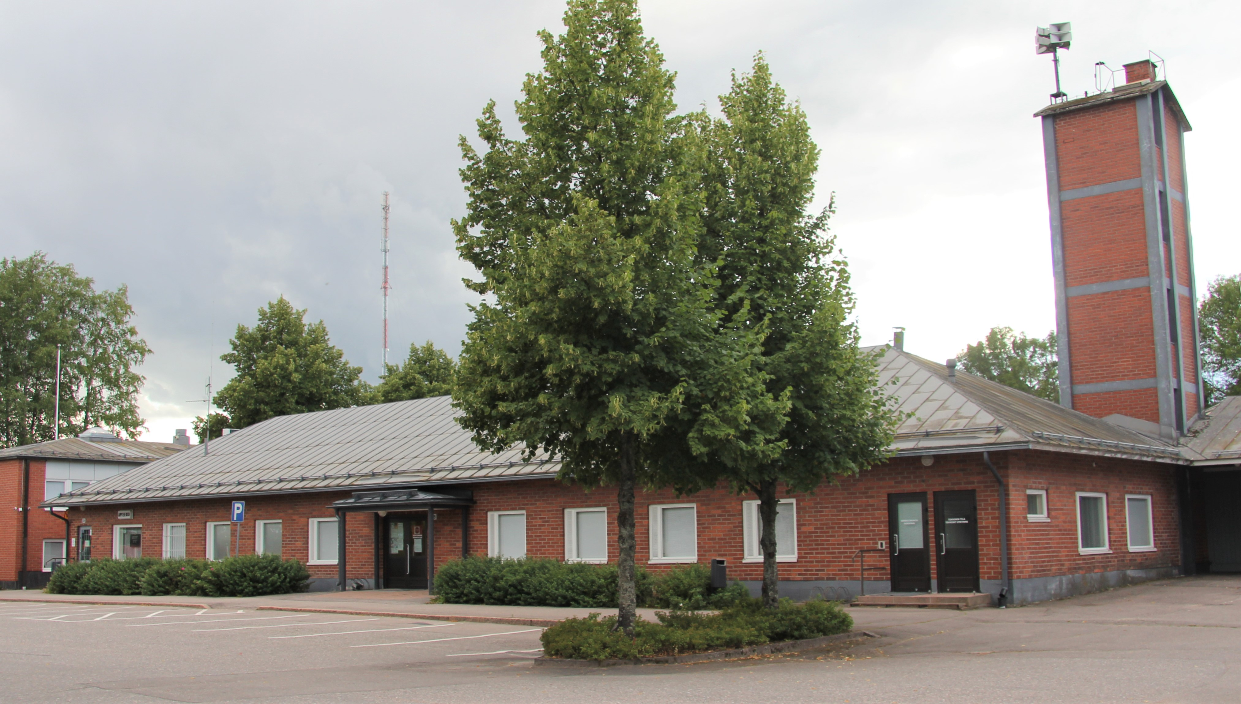 Myrskylän terveysasema tarjoaa perustason terveyskeskuspalveluja Myrskylässä.